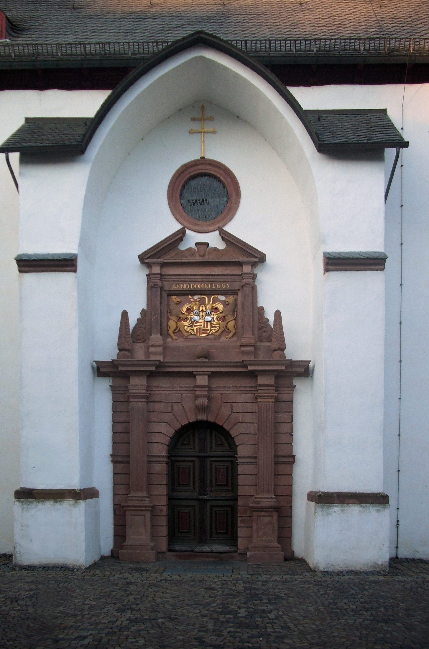 Eingang zur Pfarrkirche in Oberkirchen (Schmallenberg), Hochsauerlandkreis